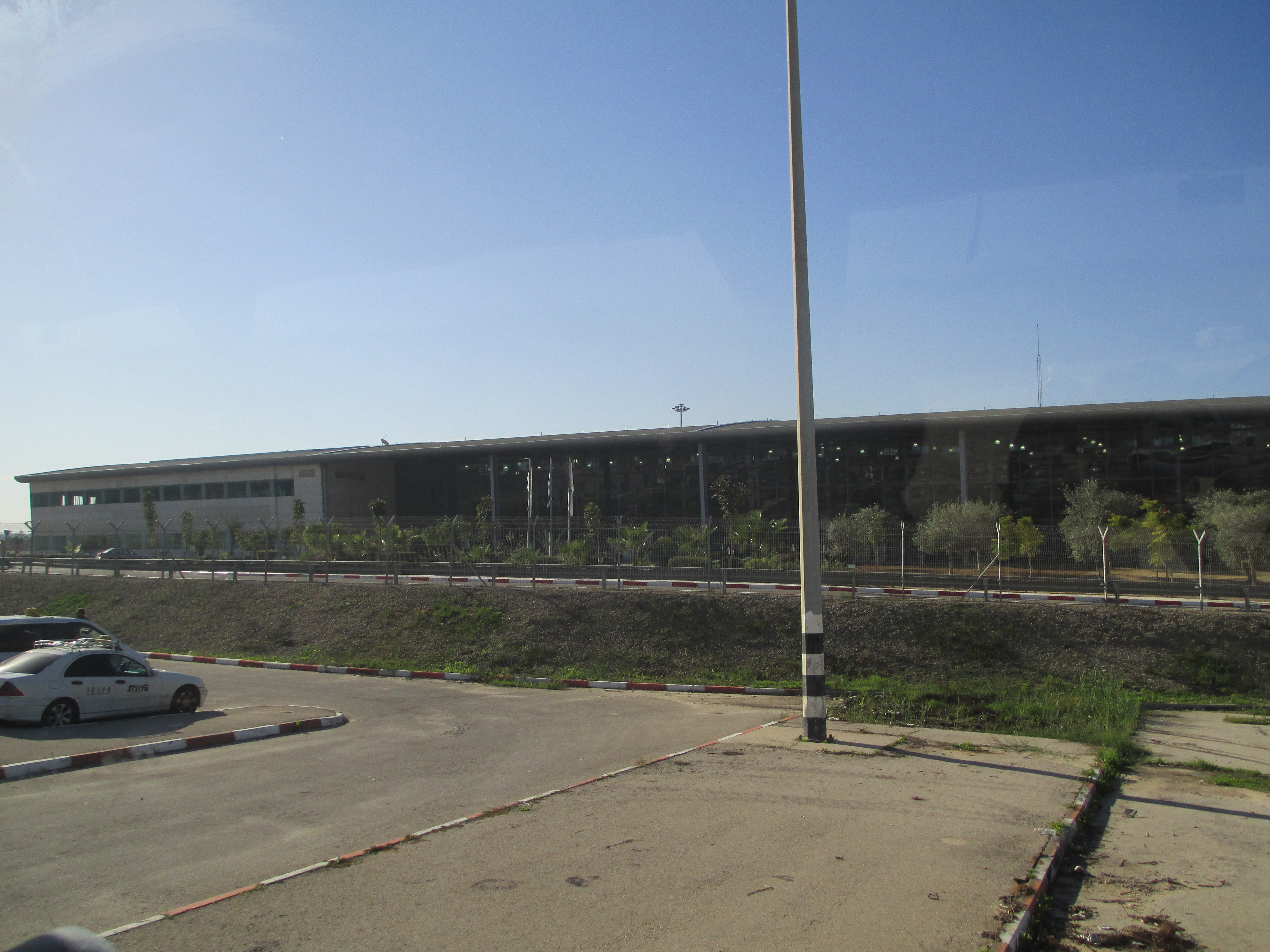 מעבר ארז